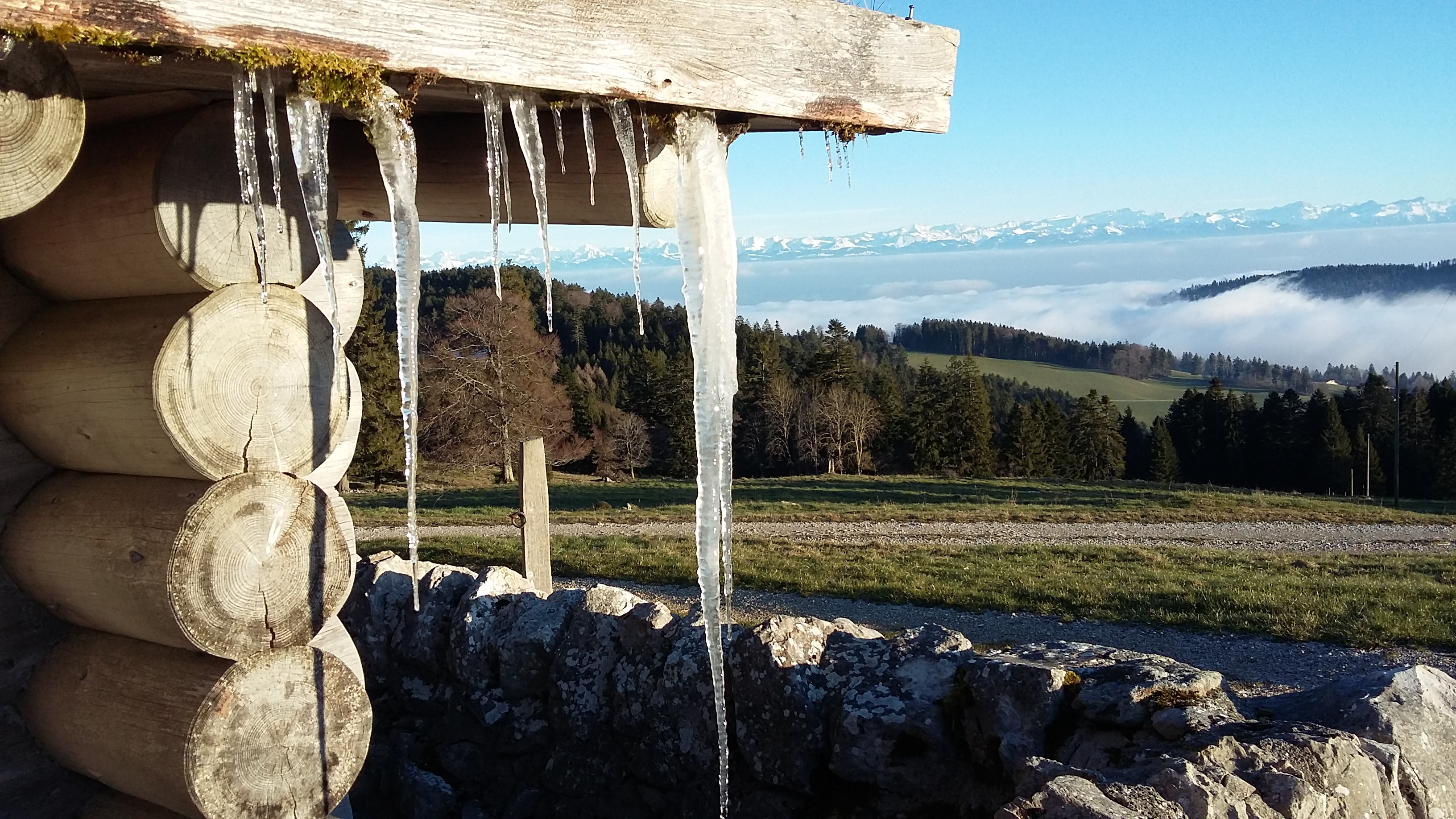 Vue sur les Alpes depuis le chalet des Cernys